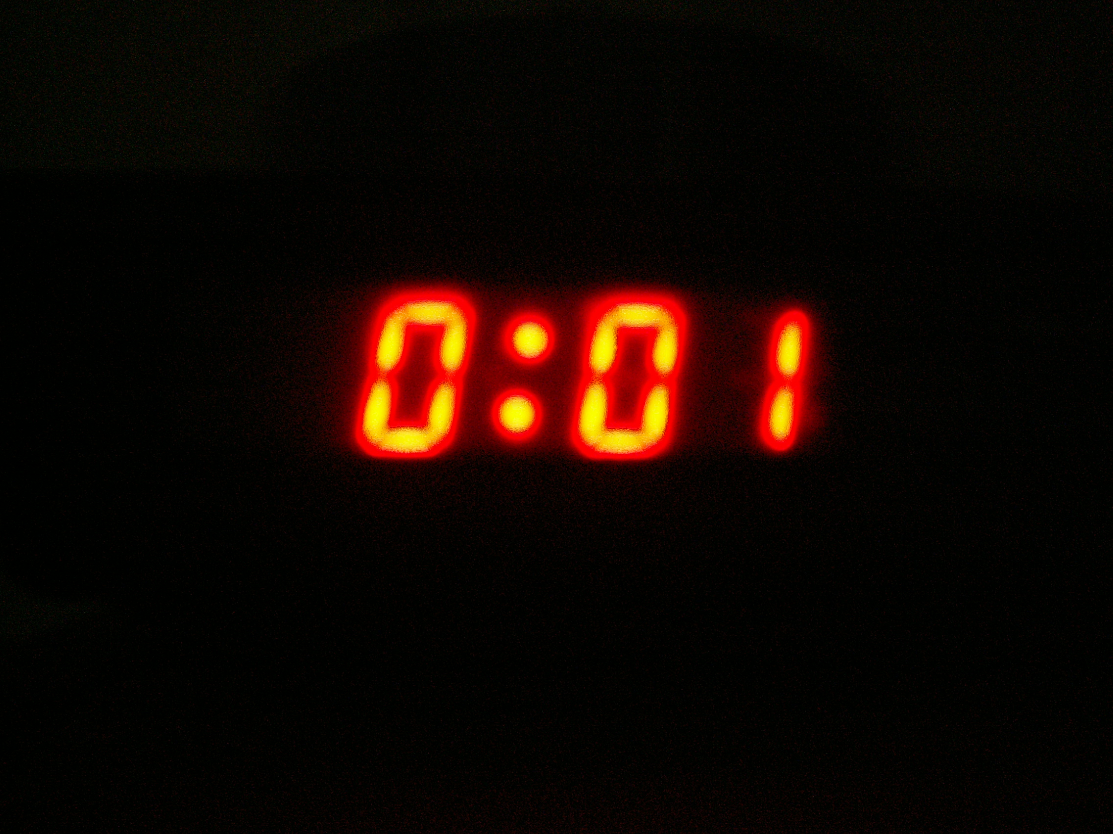 Just a minute